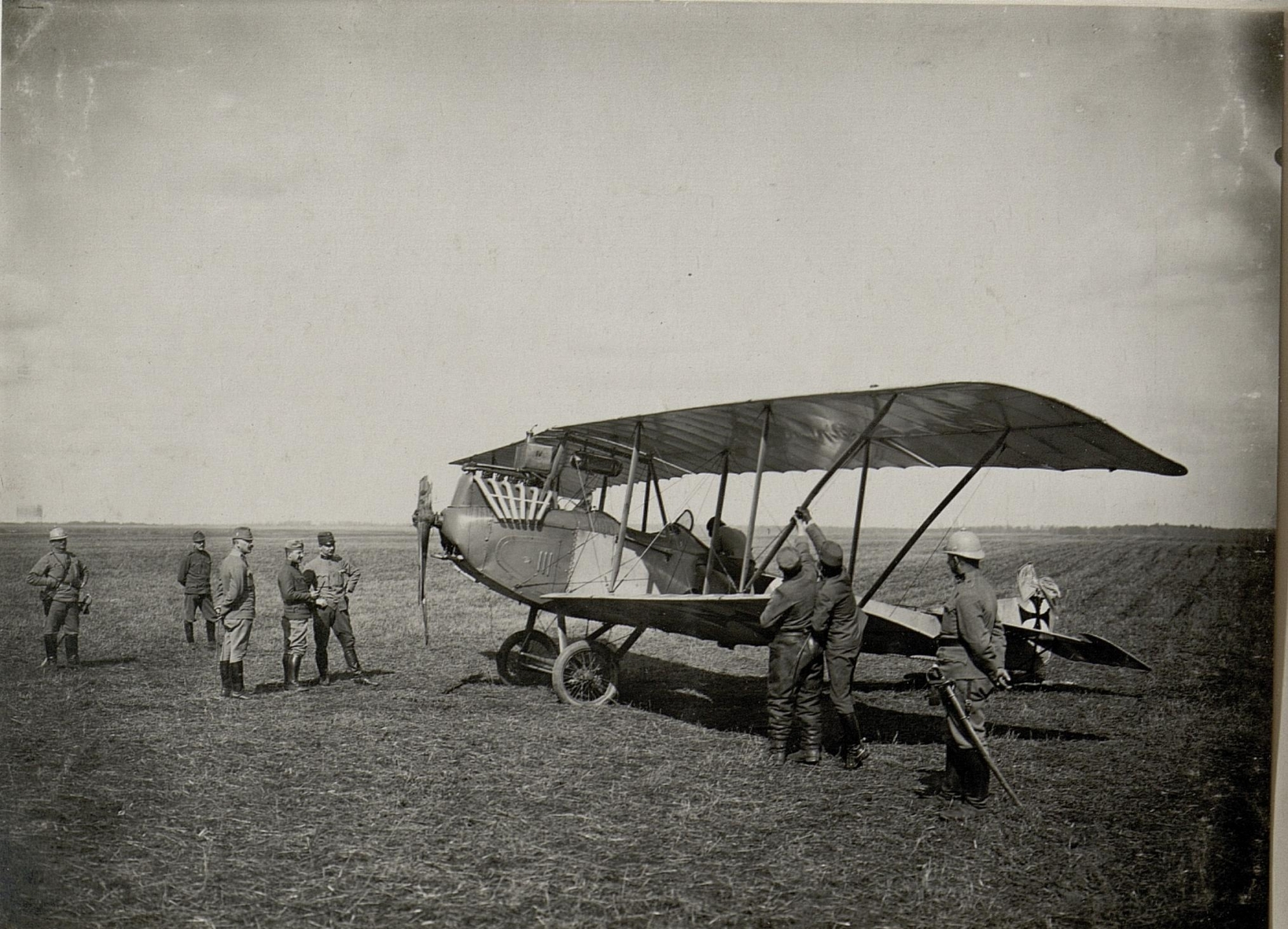 Ein abgestürzter k.u.k. Doppeldecker in Ostrozets, aufgenommen in Wolhynien am März 1916